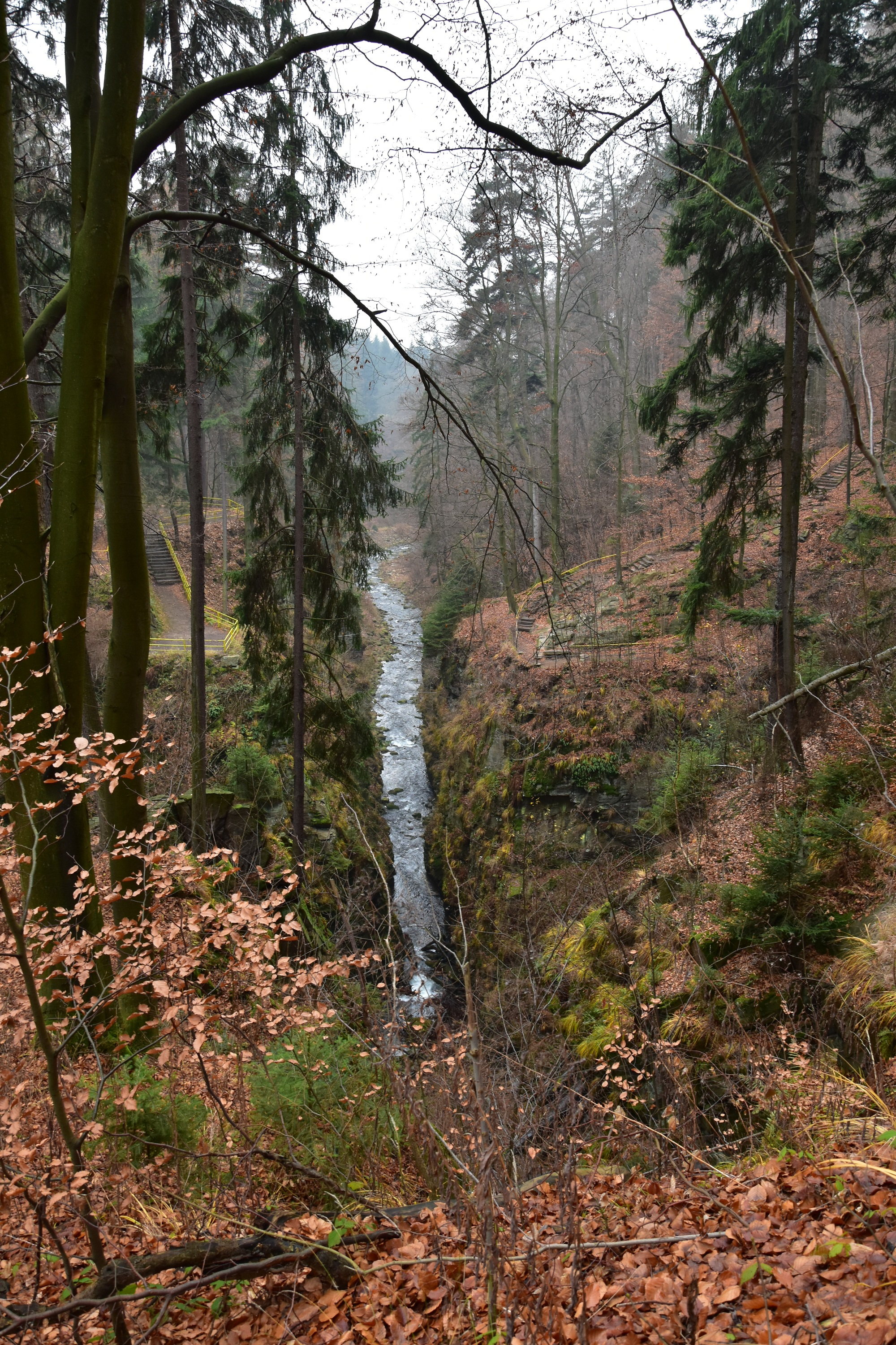 Widok na jar Wilczki z tarasu widokowego